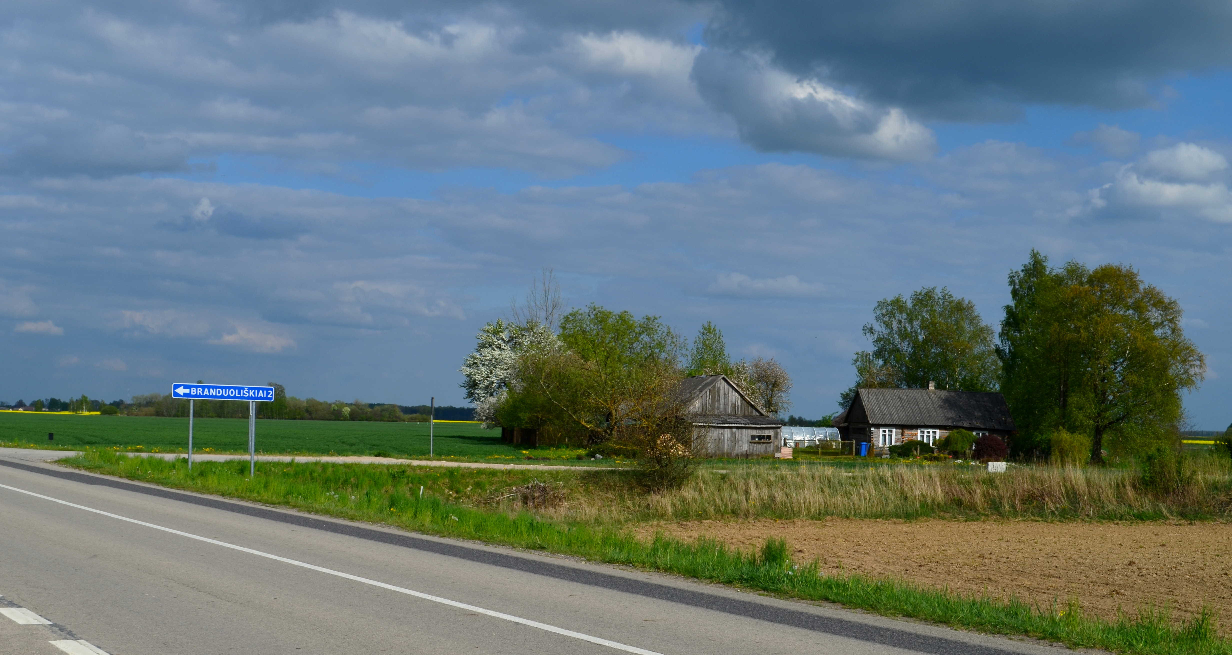 Branduoliškiai, Šakių raj.